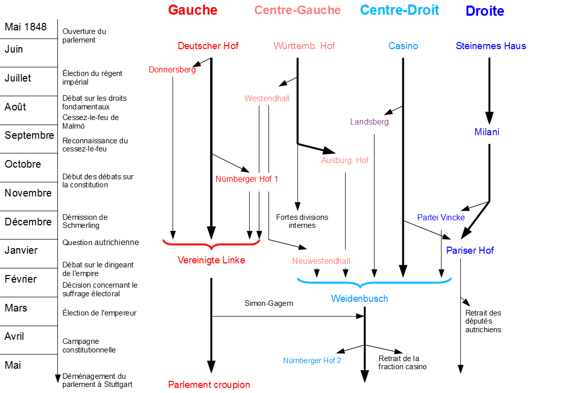 évolution de la structure des fractions dans le Parlement de Francfort de 1848 et 1849 d'après Siemann.